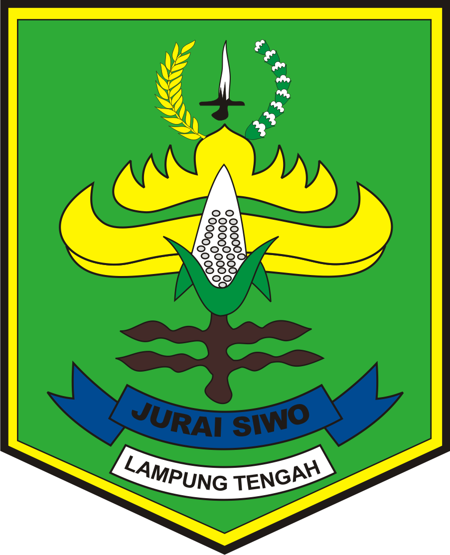 Logo Lama Kabupaten Lampung Tengah